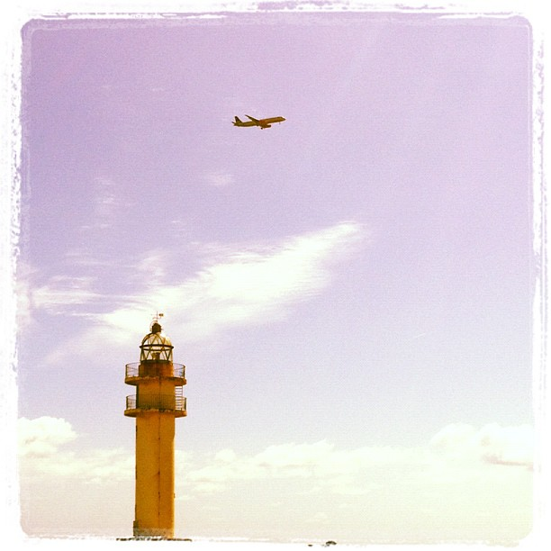 Faro de Taliarte guiando a los aviones al aeropuerto